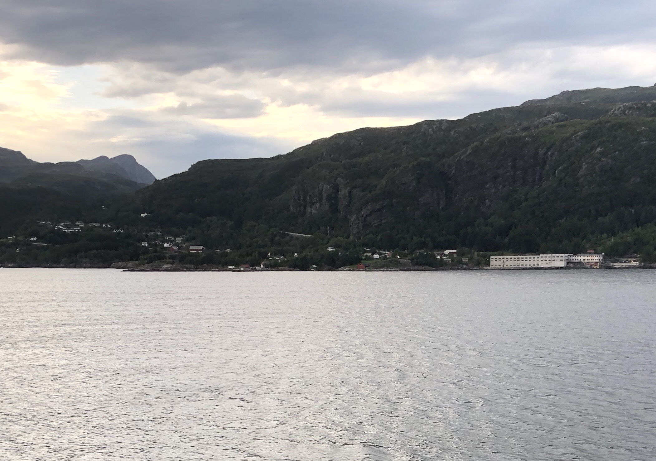 Allmenningen Blick von Süden 2019